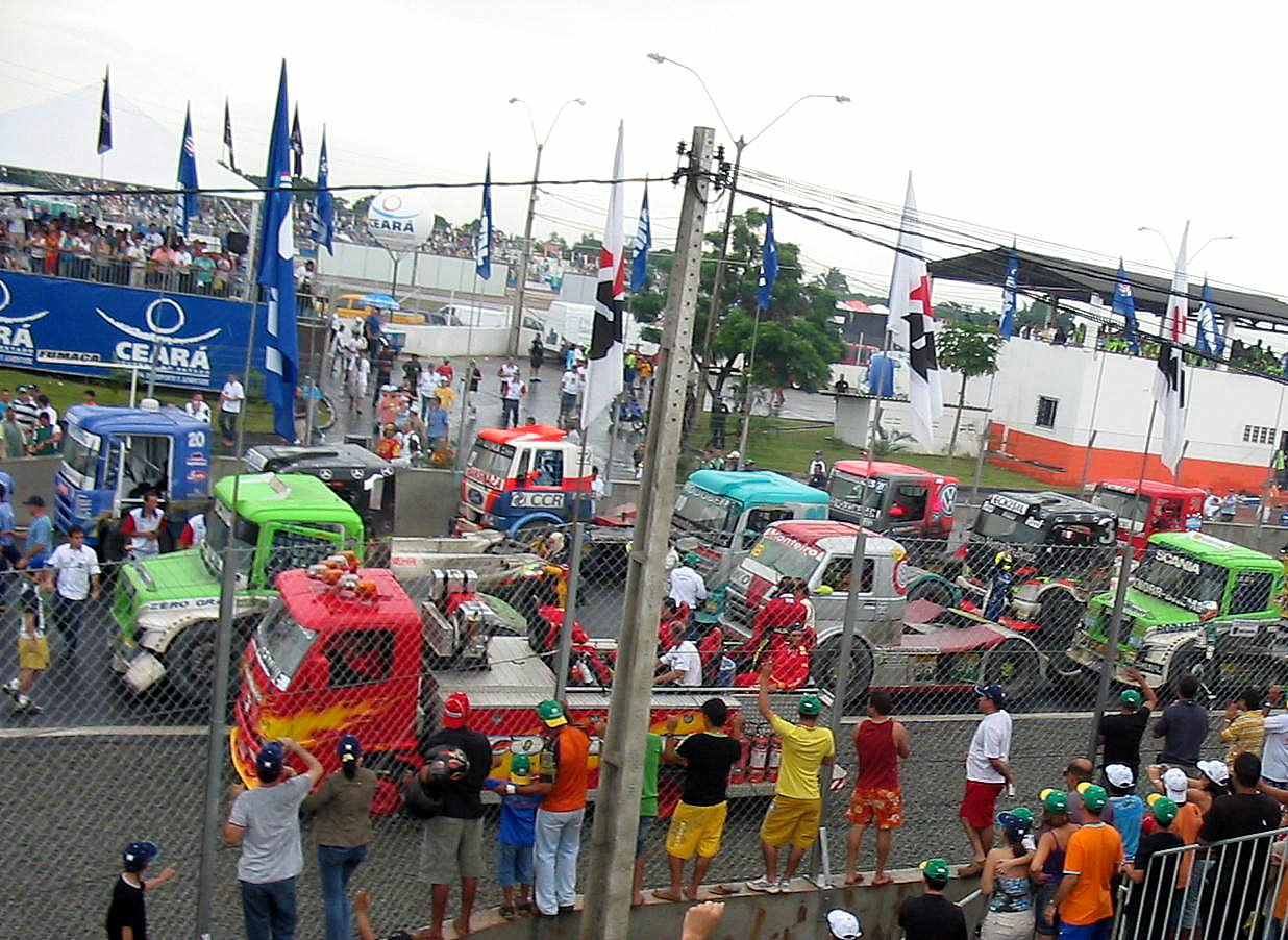 Foto dos caminhões da F-Truck no final da carrida no autódromo do Eusébio.